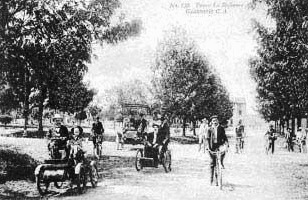 Paseo de la Reforma en 1910